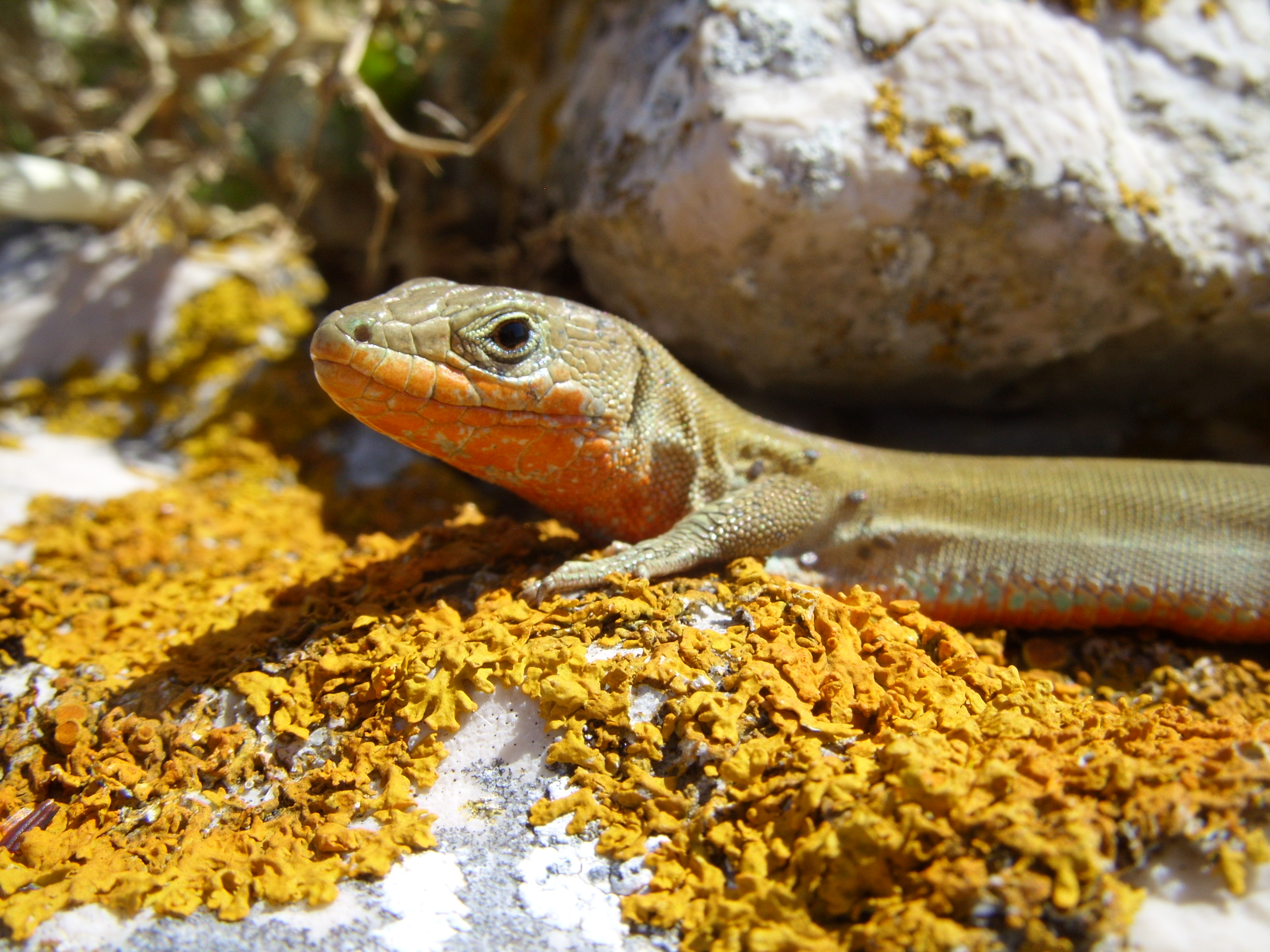 Przyjazna murówka adriatycka na wyspie Cres 2014 rok Została nazwana Emma.